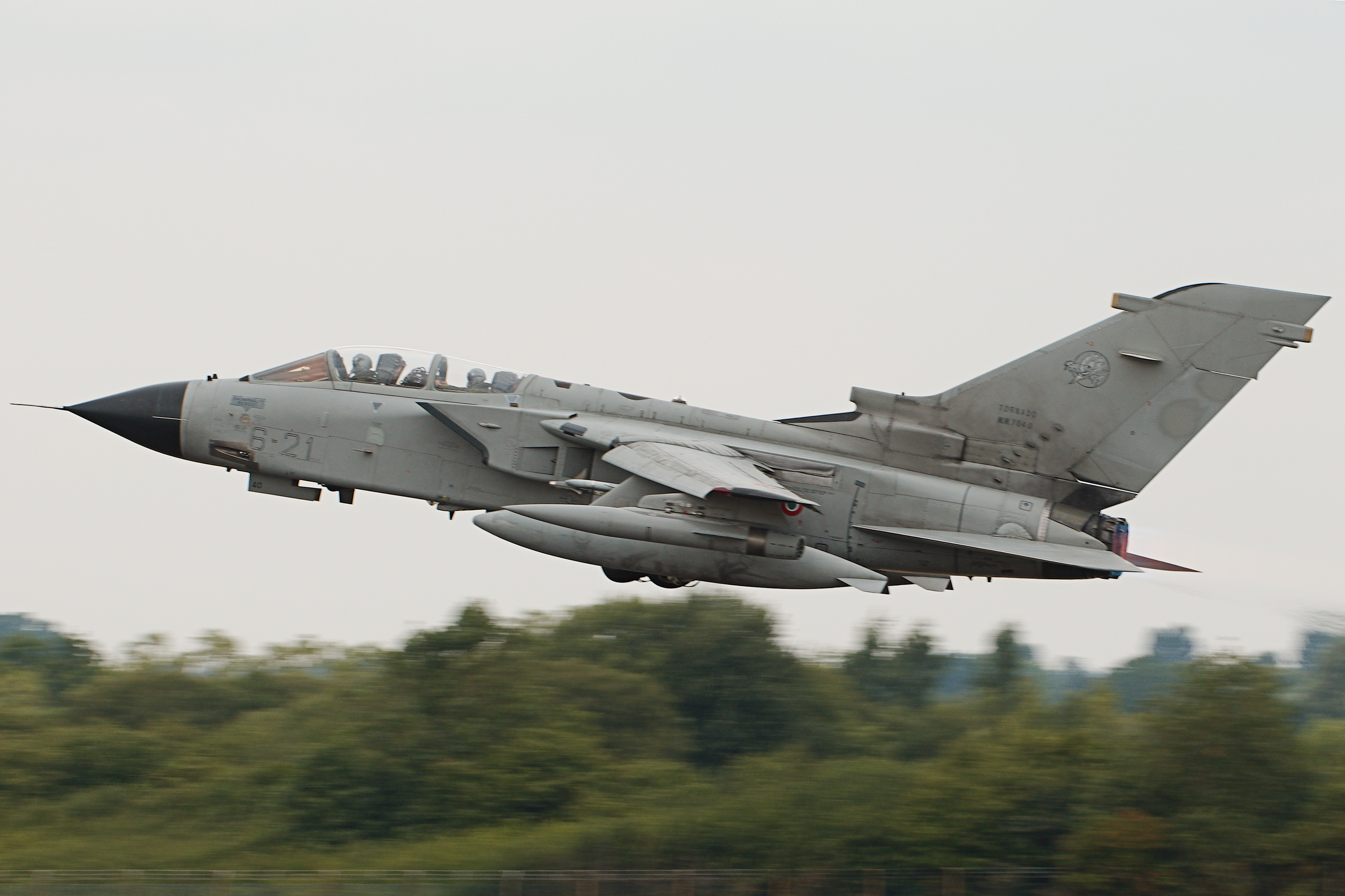 Tornado - RIAT 2018